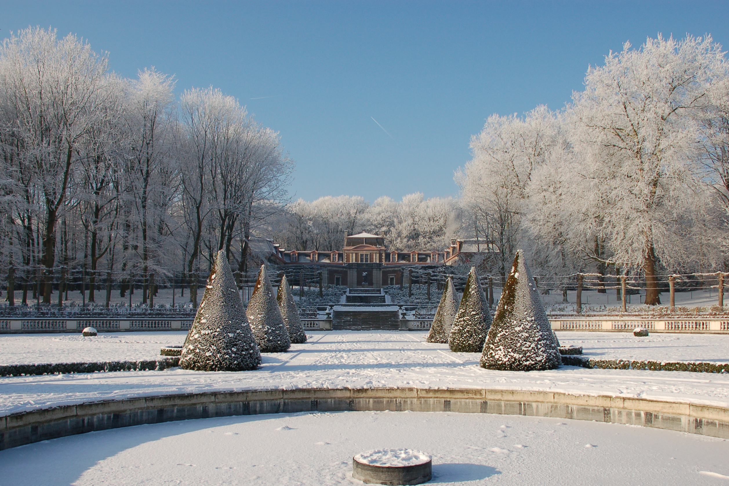 Domein 3 Fonteinen, Franse tuin, Vlaams Brabant, Vilvoorde